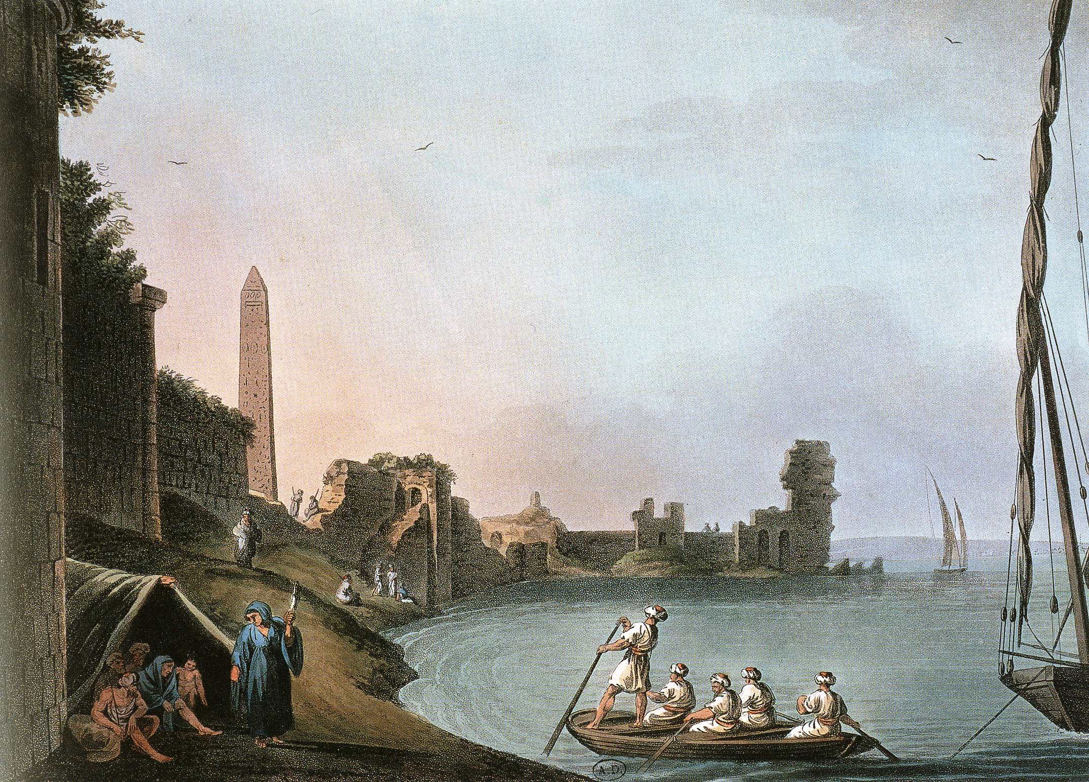 Les fortifications d'Alexandrie.